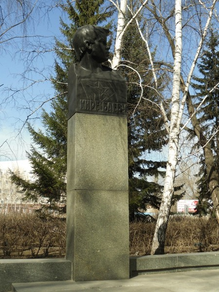 Бюст пионера-партизана Киры Баева, 1970 г.: улица Пионеров, 2, Барнаул, Алтайский край